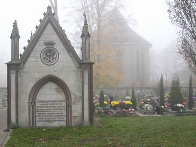 Iłowa, Cmentarz Komunalny